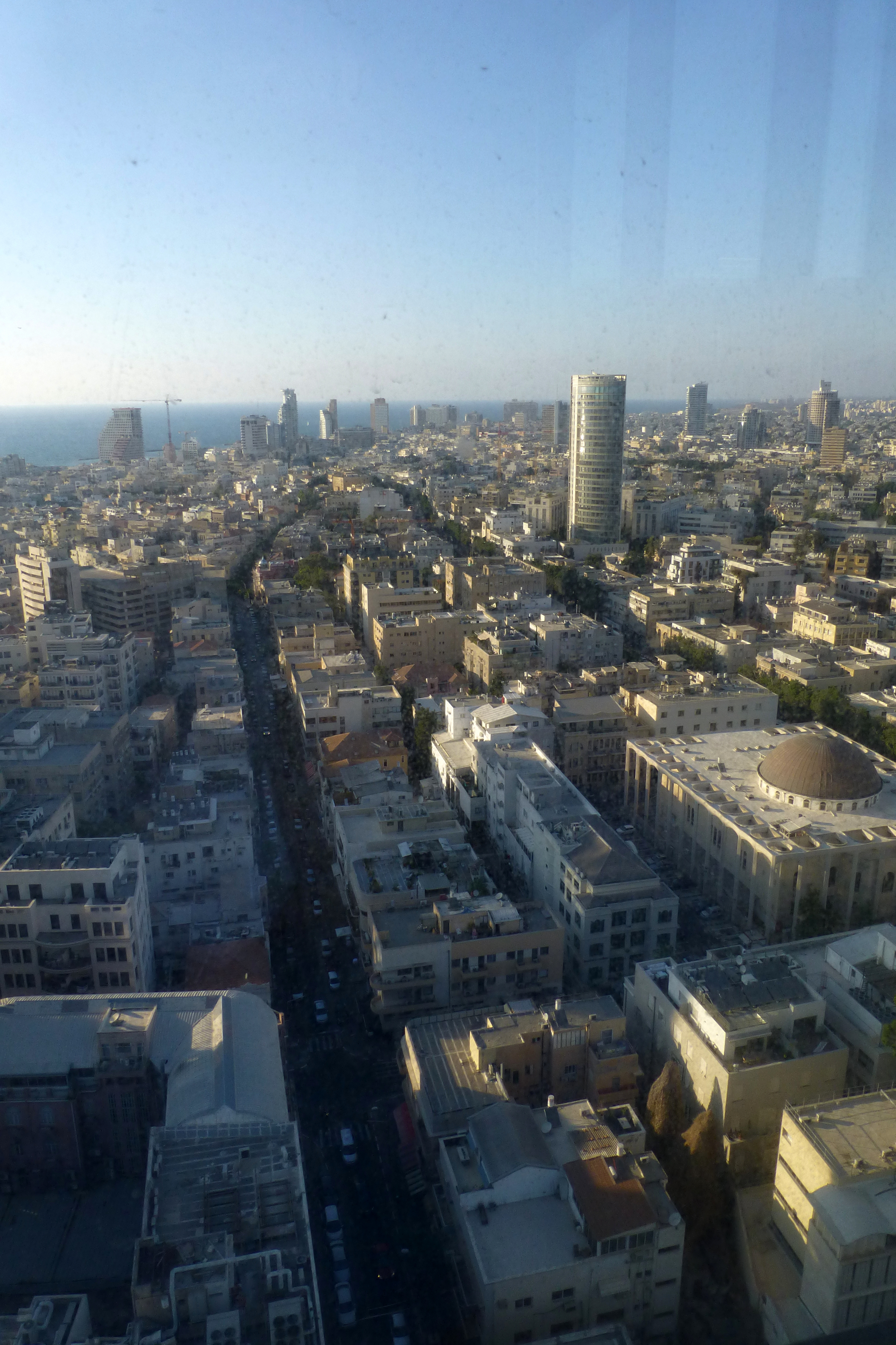 רחוב אחד העם הוא אחד הרחובות הוותיקים במרכזה ההיסטורי של תל אביב הקרוי על שמו של הסופר הציוני אחד העם (שם העט של אשר צבי גינצברג) שגם התגורר ברחוב עד מותו. הרחוב מתחיל בקצה שכונת שבזי במערב ומסתיים במתחם הבימה בצפון מזרח, בפינת שדרות בן ציון, והוא אחד הרחובות החשובים של רובע לב תל אביב.